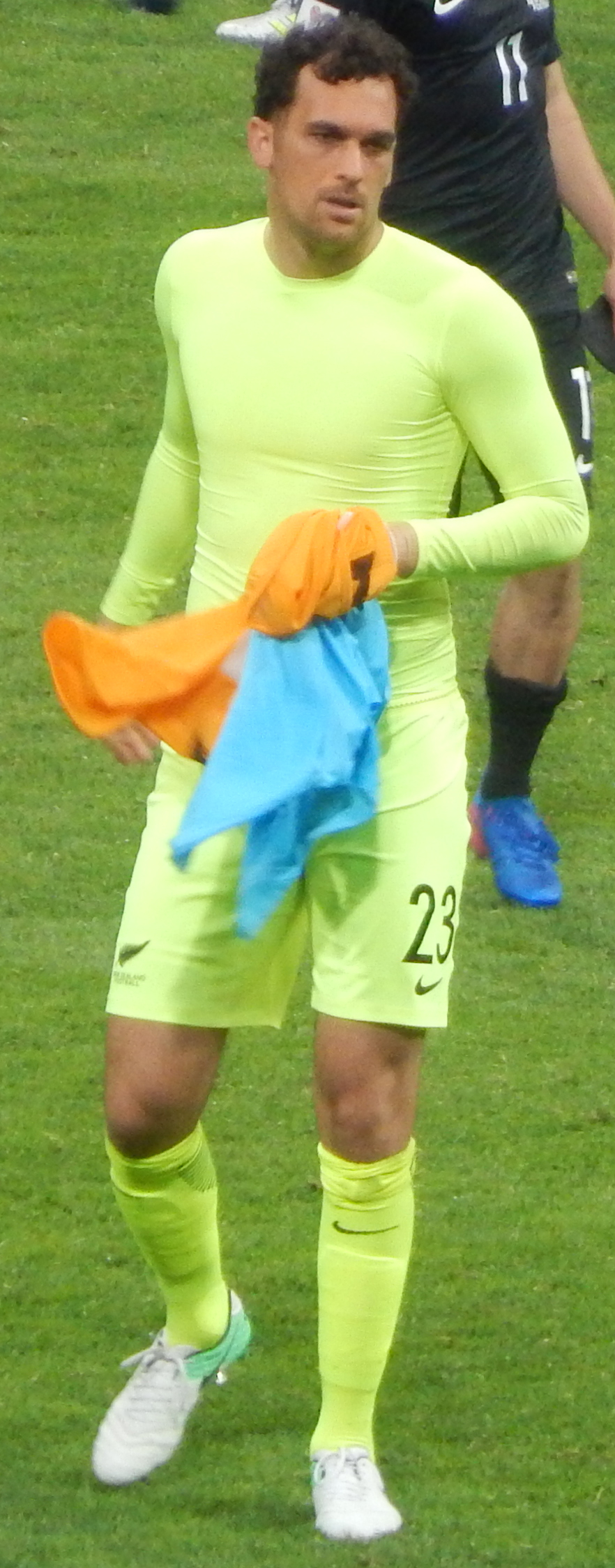 Тамати Уильямс в матче против сборной Мексики